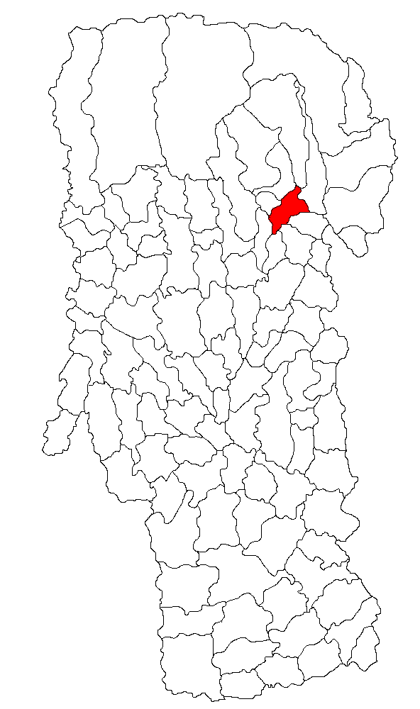 Categorie:Hărţi ale judeţului Argeş Licensing [modifică] Administraţie Municipiul este format din 8 cartiere: •Centru •Vişoi •Valea Româneştilor •Schei •Grui •Mărcuş •Flămânda •Rotunda [modifică] Istorie Vezi şi Laurencius de Longo Campo [modifică] Educaţie •Şcoli oCasa de Copii Şcolari Nr. 1 - Baieţi oŞcoala de Muzică şi Arte Plastice oŞcoala Generală Nr. 1 Oprea D. Iorgulescu oŞcoala Generală Nr. 2 oŞcoala Generală Nr. 3 oŞcoala Generală Nr. 4 oŞcoala Generală Nr. 5 oŞcoala Generală Nr. 6 oŞcoala Generală Nr. 7 oScoala "Sfantul Iacob" •Licee oCentrul Şcolar Special oColegiul Pedagogic "Carol I" oGrupul Şcolar de Construcţii de Maşini oGrupul Şcolar Industrial Minier oLiceul Industrial Nr.1 - ARO oLiceul Naţional de Atletism oLiceul Teoretic "Dan Barbilian" oColegiul National "Dinicu Golescu" oŞcoala Profesională Auto oŞcoala Specială Medie Tehnică de Contabilitate Nr. 13 oSeminarul Teologic Liceal Ortodox •Universităţi, facultăţi